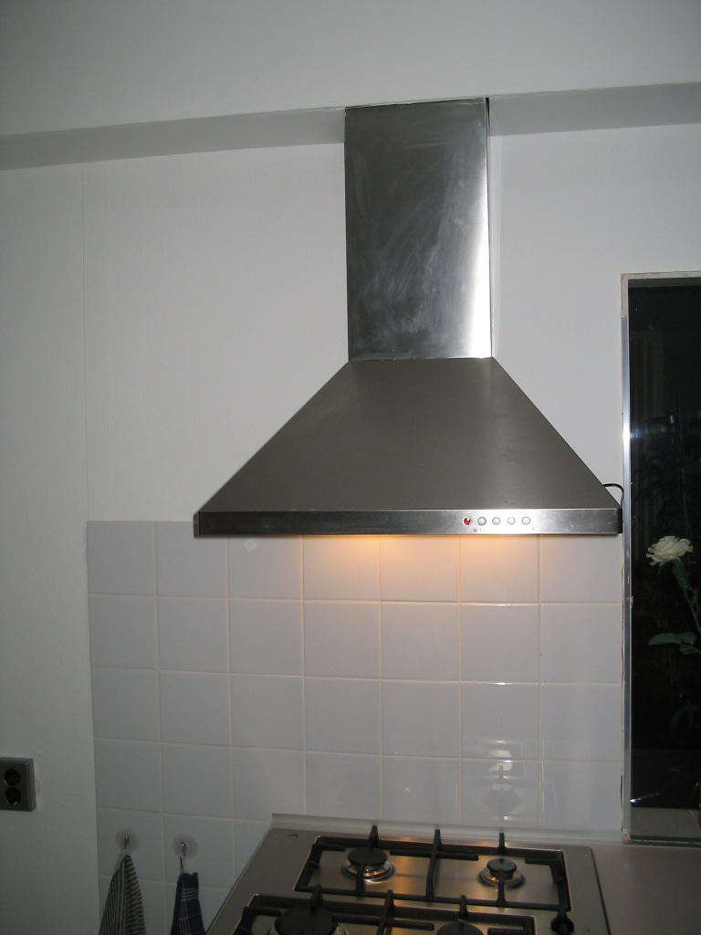 afzuigkap